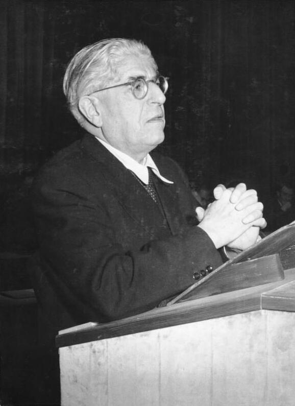 Berlin, Ernst Bloch auf Begegnung der Geistesschaffenden Zentralbild Quasch/Krueger 8.11.1954 "Deutsche Begegnung" der Geistesschaffenden in Berlin 1954 Mehr als 500 Teilnehmer aus verschiedensten geistigen Kreisen kamen als Vertreter verschieder religiöser und politischer Bekenntnisse in Berlin zusammen, um zu beraten, wie die Verständigung der Deutschen untereinander verstärkt werden kann. In Beratungen, die im demokratischen Sektor und in den Westsektoren Berlins stattfanden, sprachen sich die Tagungsteilnehmer zu 3 Referaten aus, welche die Grundlage der "Deutschen Begegnung" bildeten. UBz: Auf der Eröffnungsberatung am 6.11.1954 in der Volksbühne am Luxemburgplatz: Es sprach Professor Dr. Ernst Bloch. Abgebildete Personen: Bloch, Ernst Prof. Dr.: Philosoph, Friedenspreis des Deutschen Buchhandels 1967, Bundesrepublik Deutschland (GND 118511742)